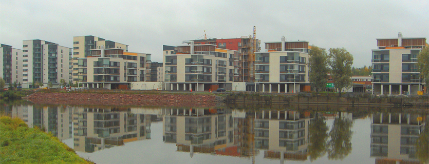 Karjaranta District, Pori